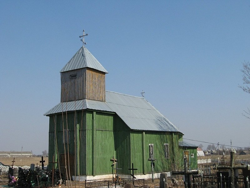 Дабрынёва. Пакроўская царква